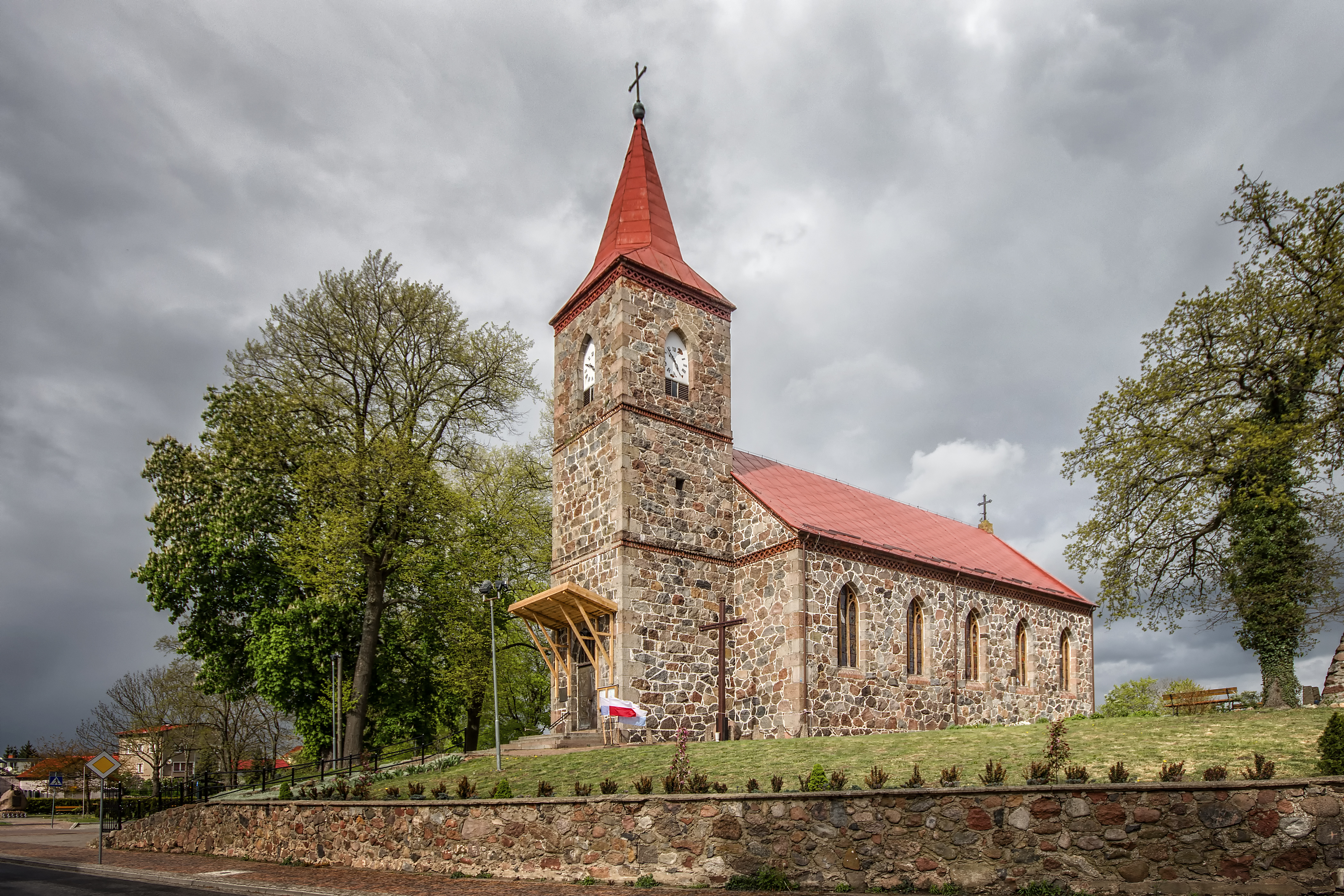 Gościno, kościół ewangelicki, ob. rzym.-kat. par. pw. św. Andrzeja Boboli, 1853-1854, 1865